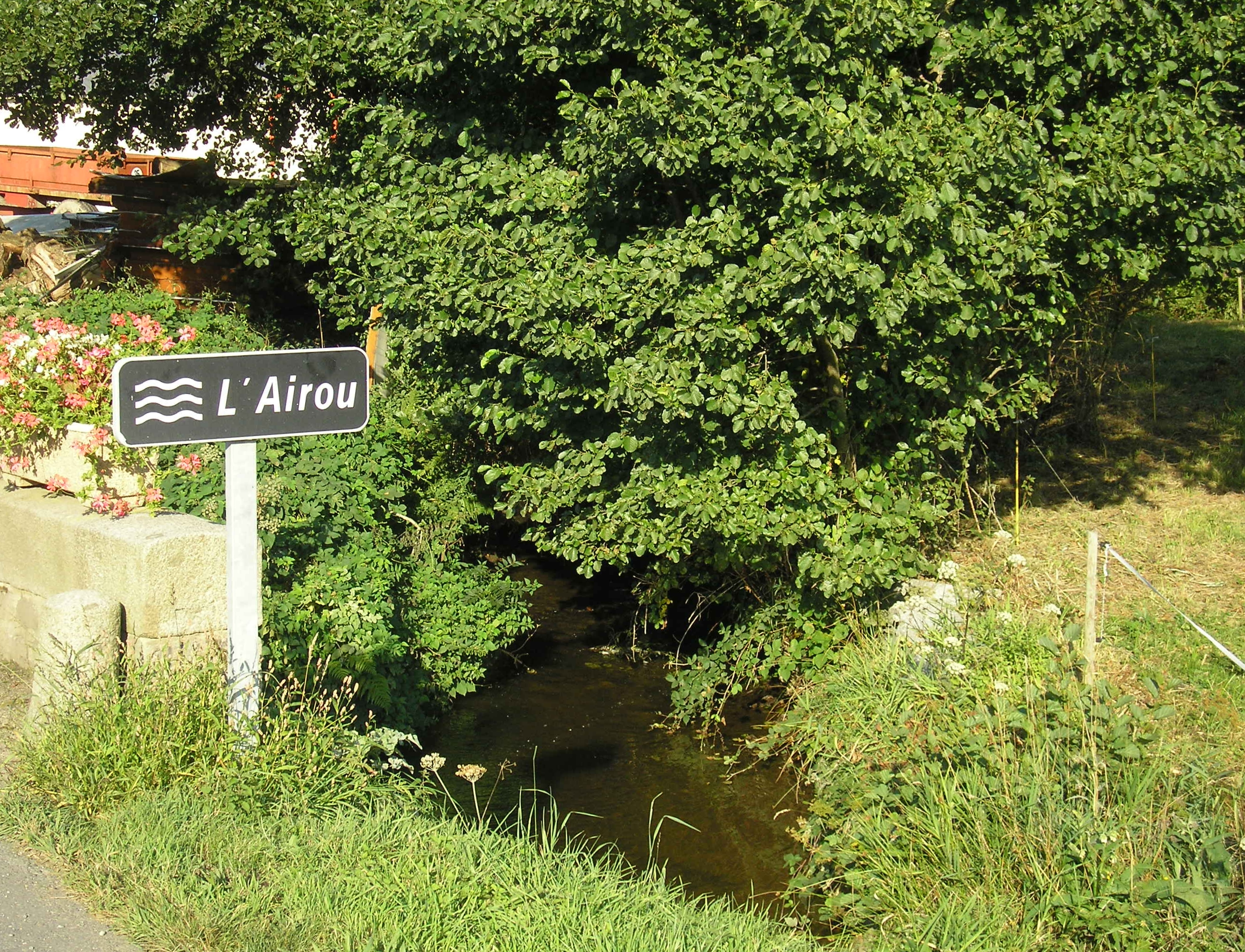 La Lande-d'Airou (Normandie, France). L'Airou.